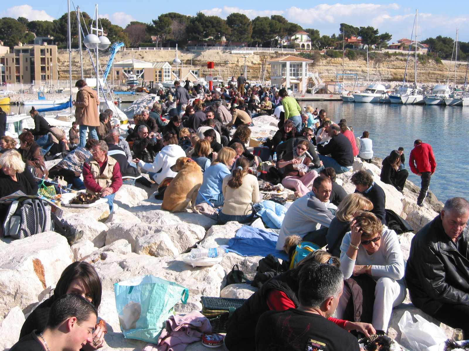 Les Oursinades sur le port de Carry-le-Rouet, Bouches-du-Rhône, France